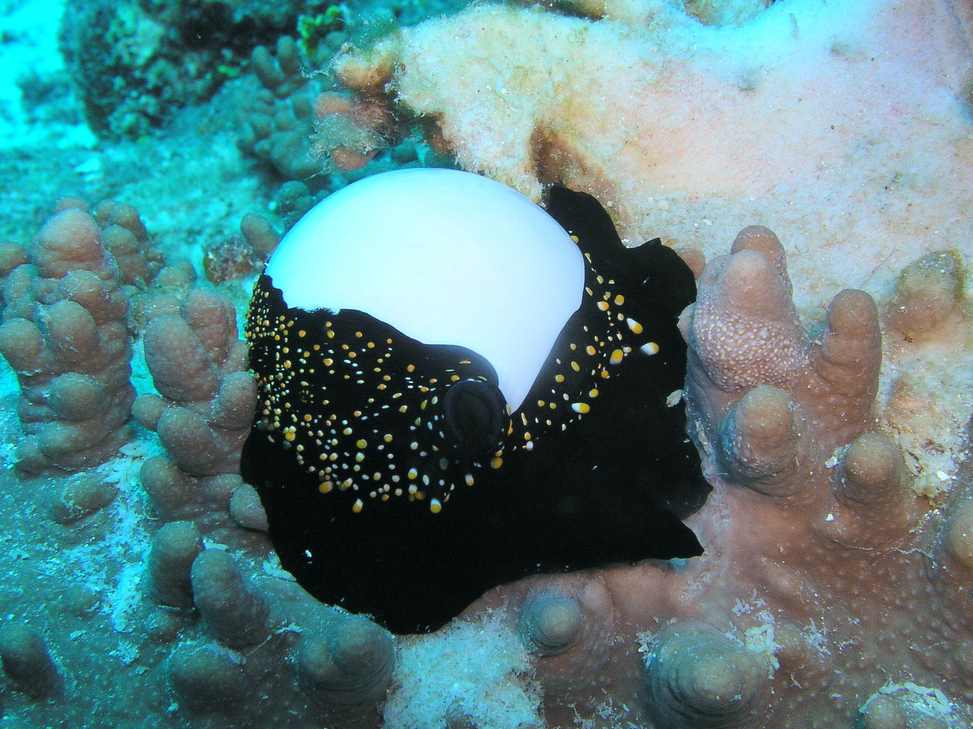 Ovula ovum, aufgenommen in Nosy Be, Madagaskar